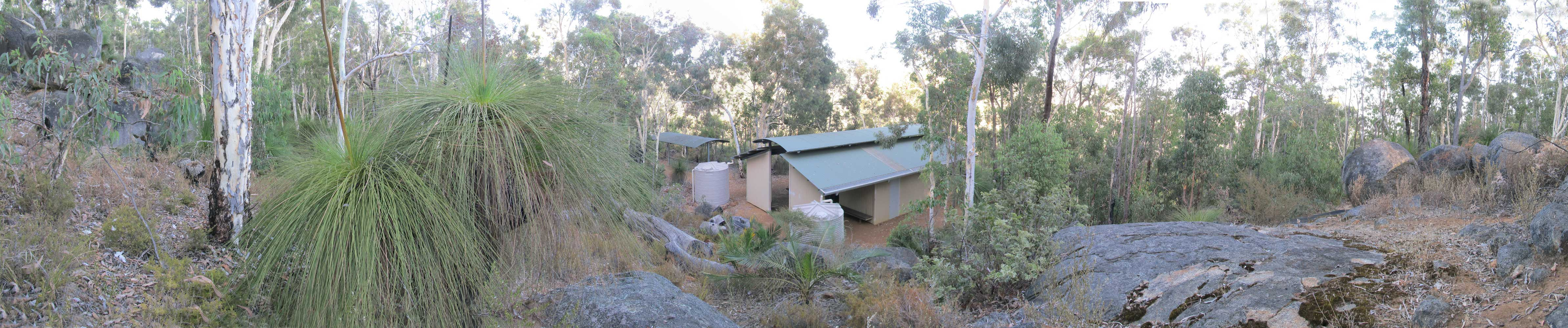 Dandalup Campsite Panorama